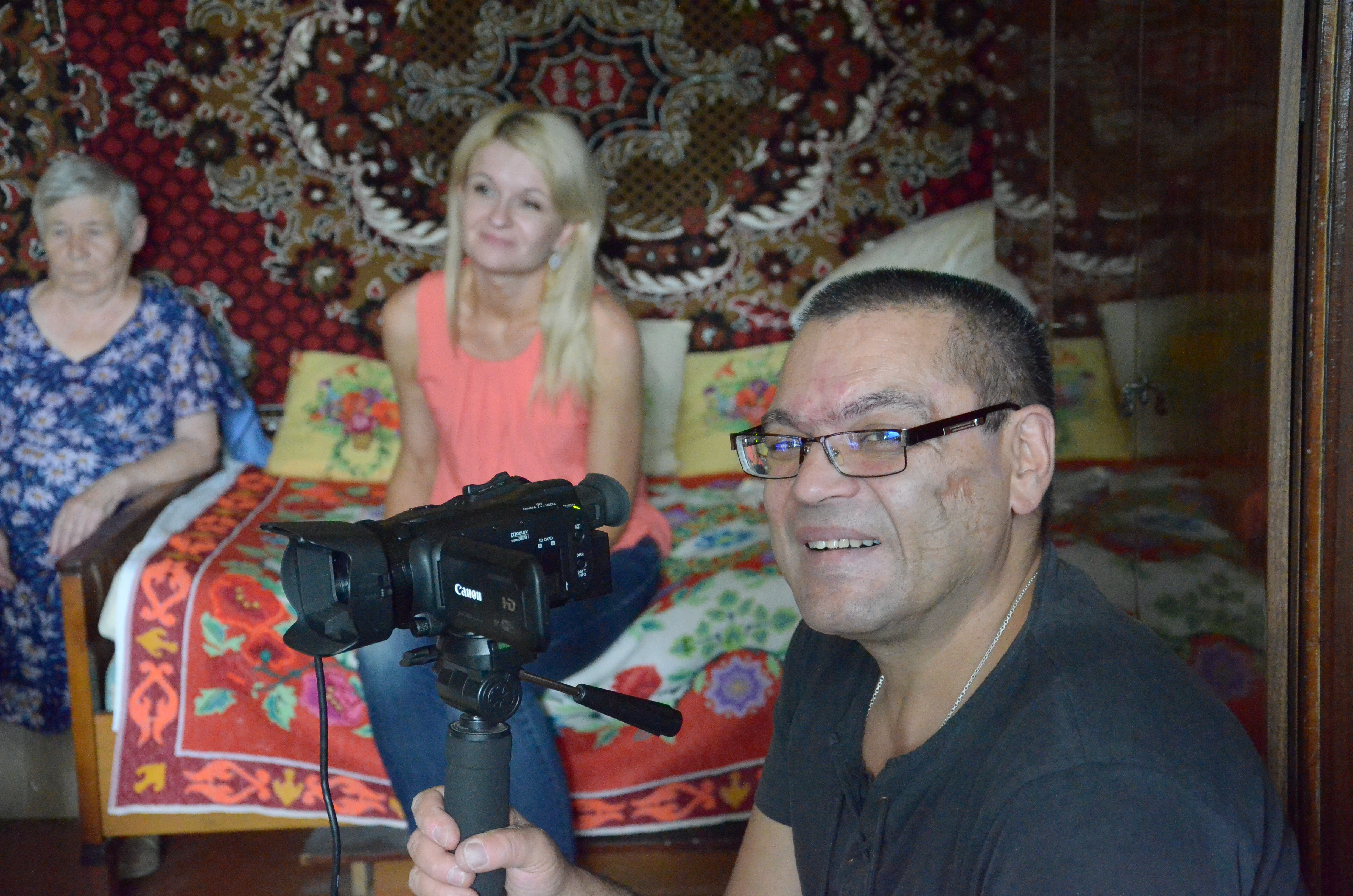 Андрей Бабицкий